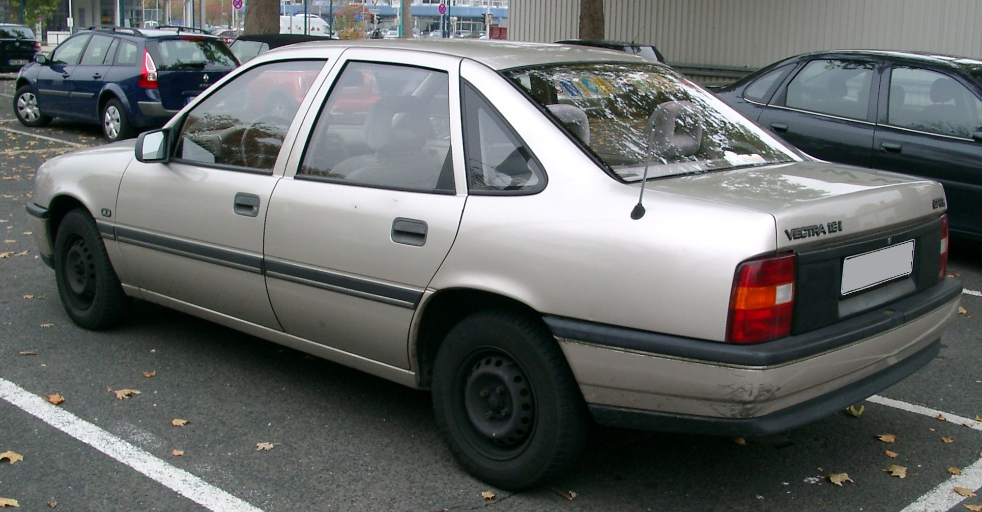 Opel Vectra A